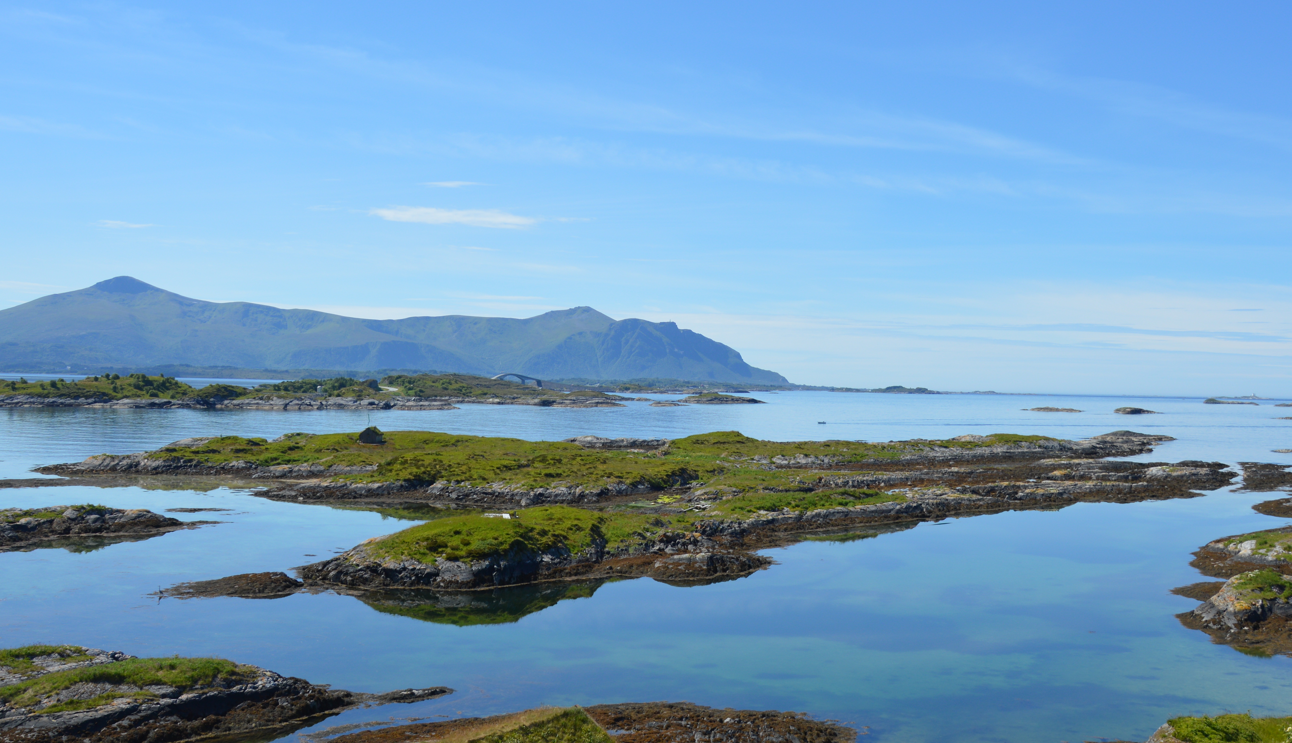 Lamholmen